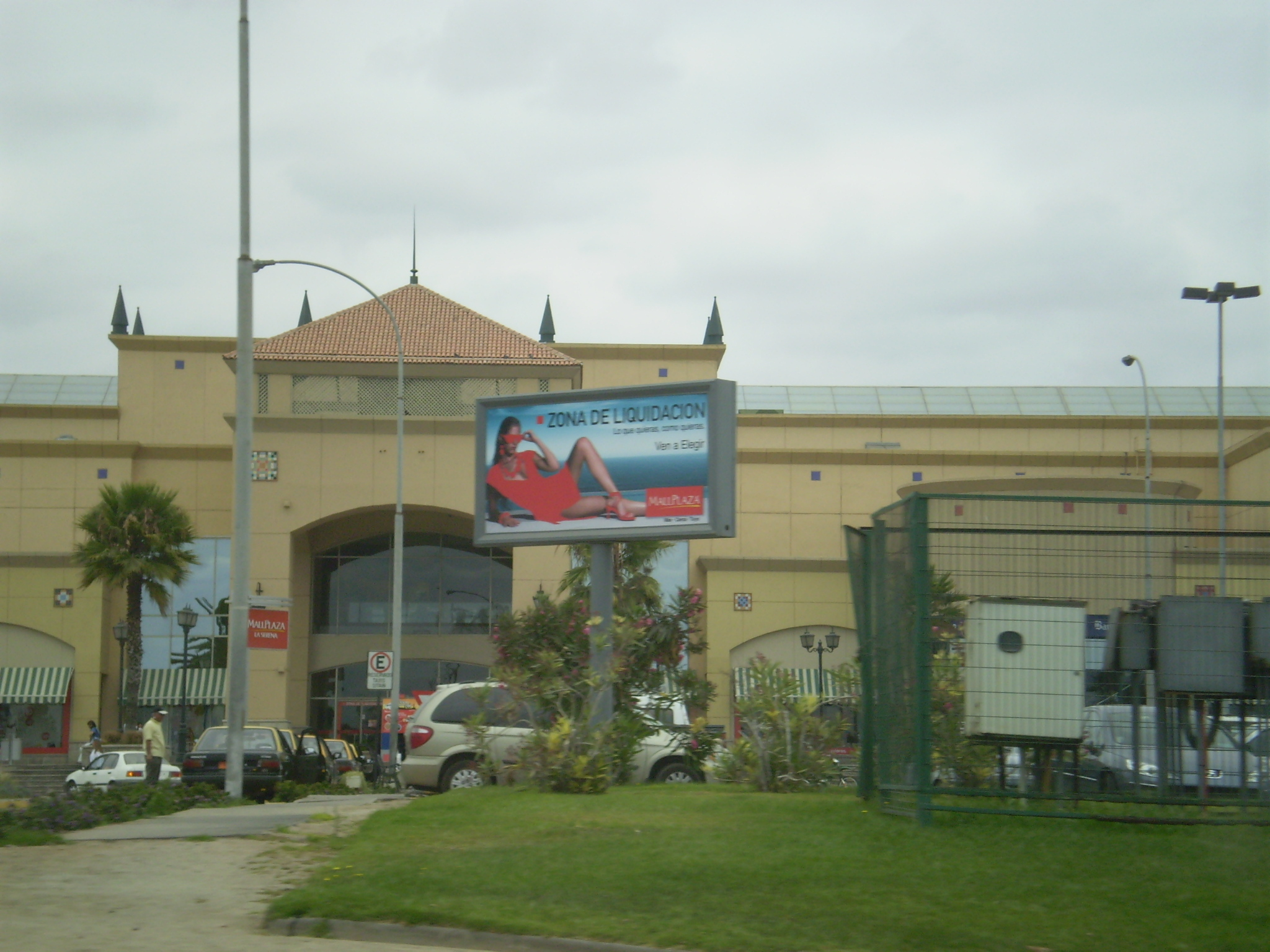 Mall Plaza La Serena (Vista desde frente, foto tomada en movimiento desde la carretera Ruta 5 Norte)